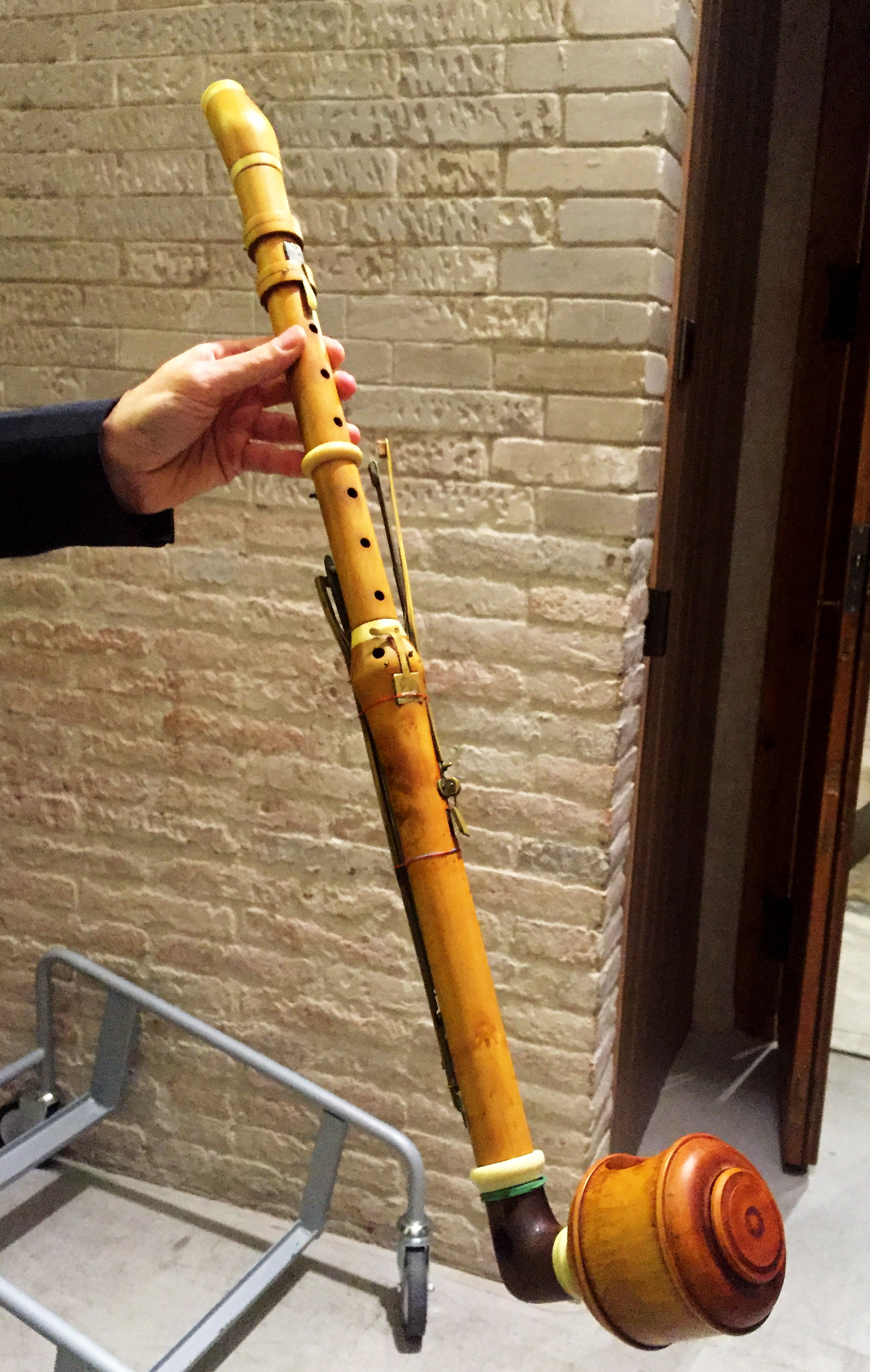 Clarinet d'Amore utilitzat per Lorenzo Coppola. 20-3-2016